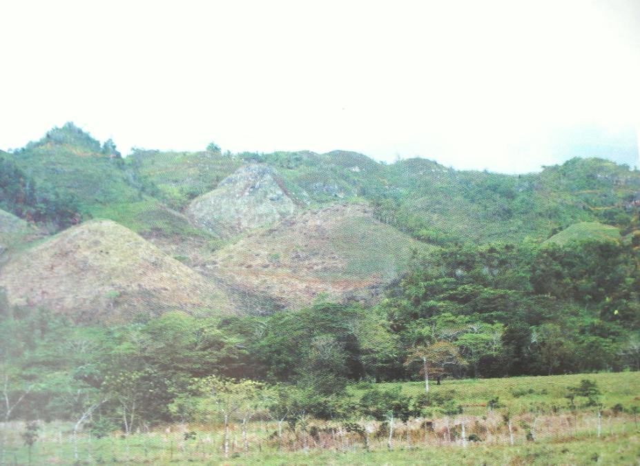 Cordillera Oriental de Republica Dominicana